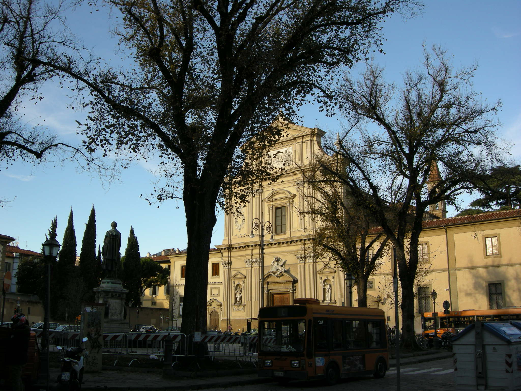 Piazza san marco, firenze